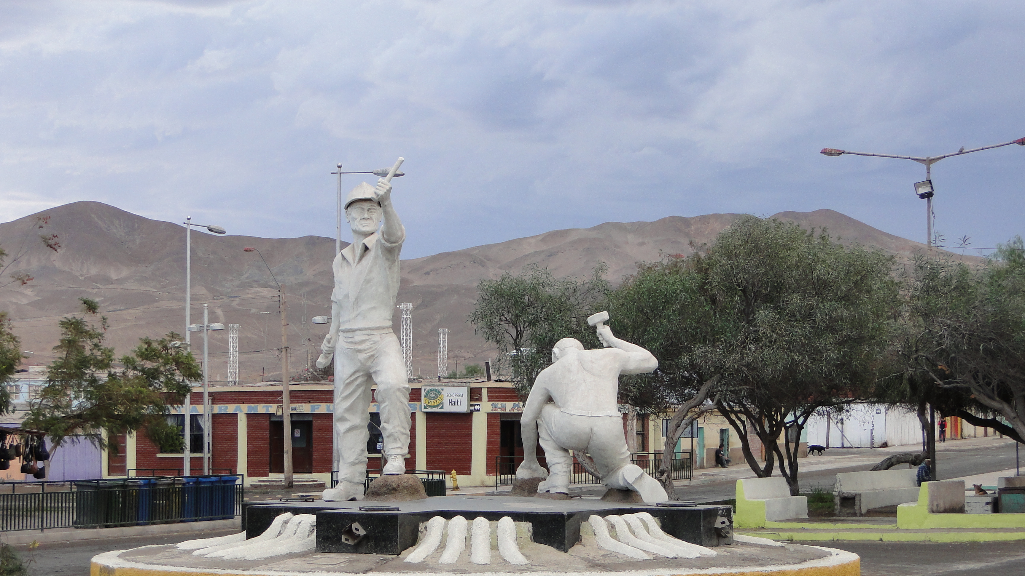 Monumento a los mineros en Diego de Almagro, Region de Atacama, Chile.